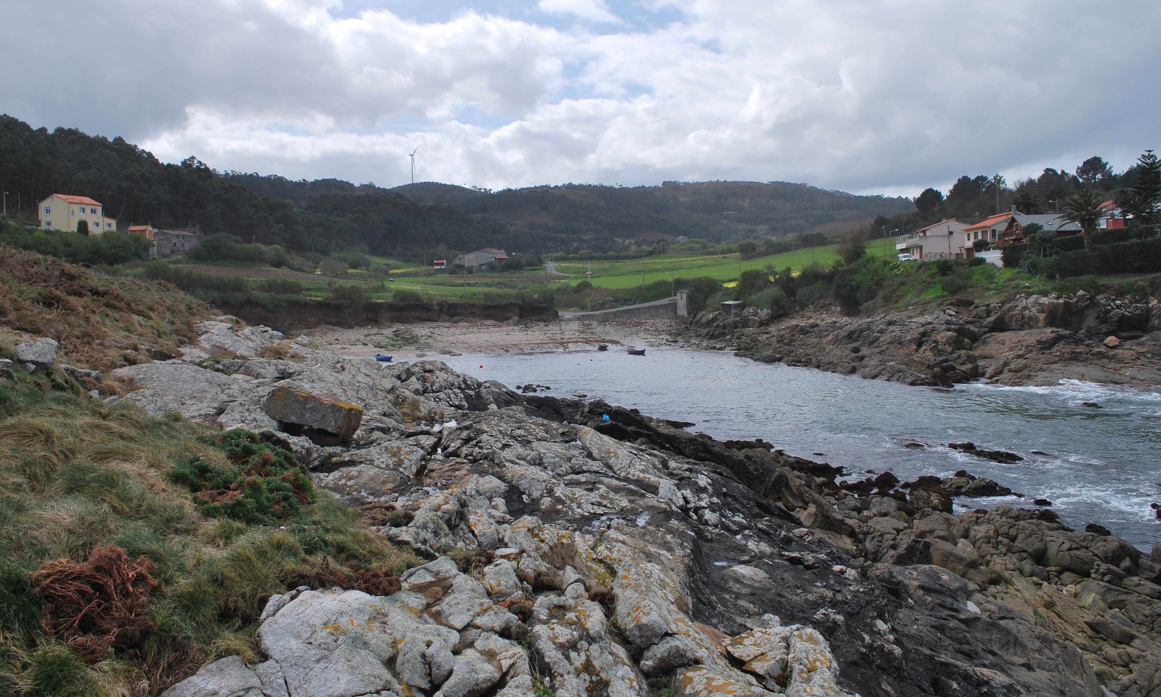 Vista do Porto en Sorrizo, Arteixo A Coruña Galiza Spain